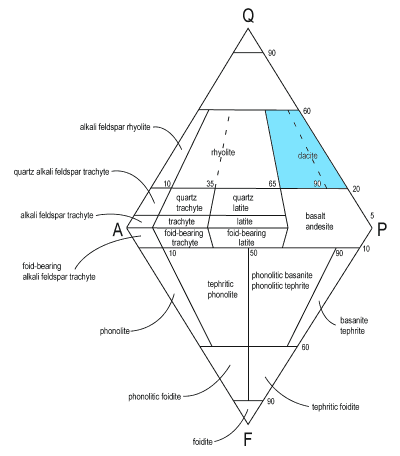 Dazitaren kokapena QAPF diagraman. Locatin of Dacite in a QPAF diagram.